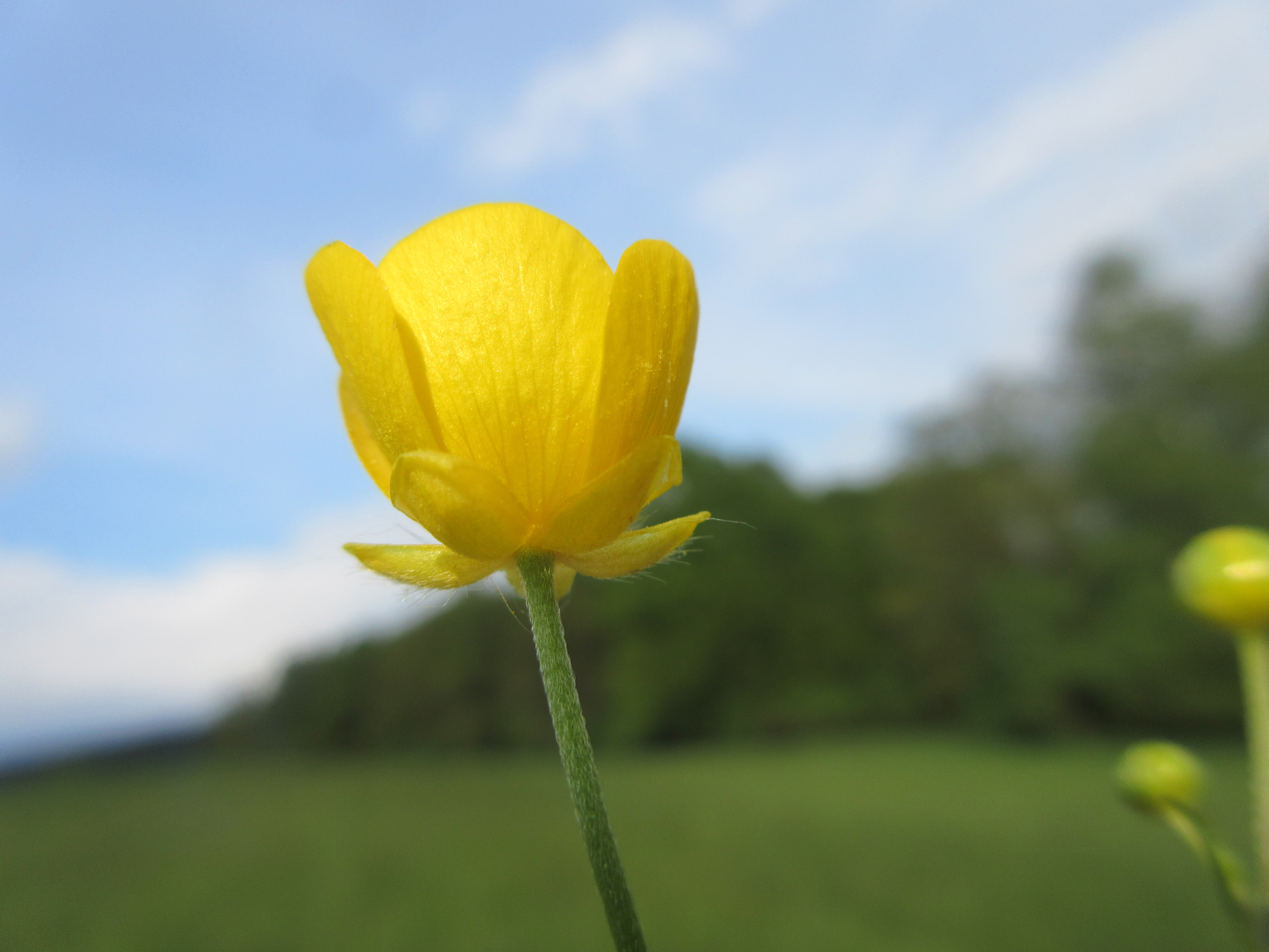 Ranunculus acris, Ústí nad Orlicí, Czech Republic